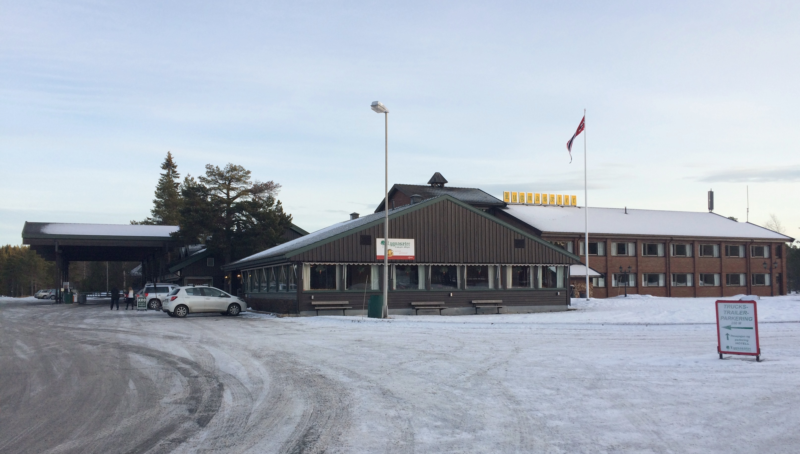 Veikro og bensinstasjon ved Lygna